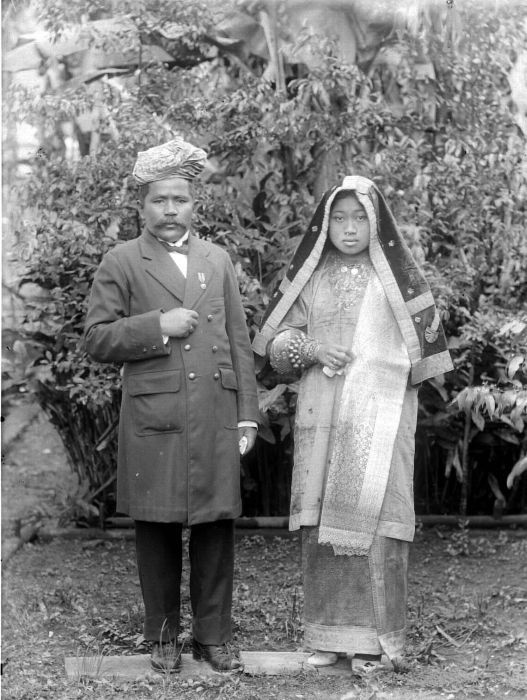 Negatief. Lokaal bestuurder ('demang') van Padangpandjang en oud lid van de Volksraad met zijn vrouw, Datu Kajo, West-Sumatra